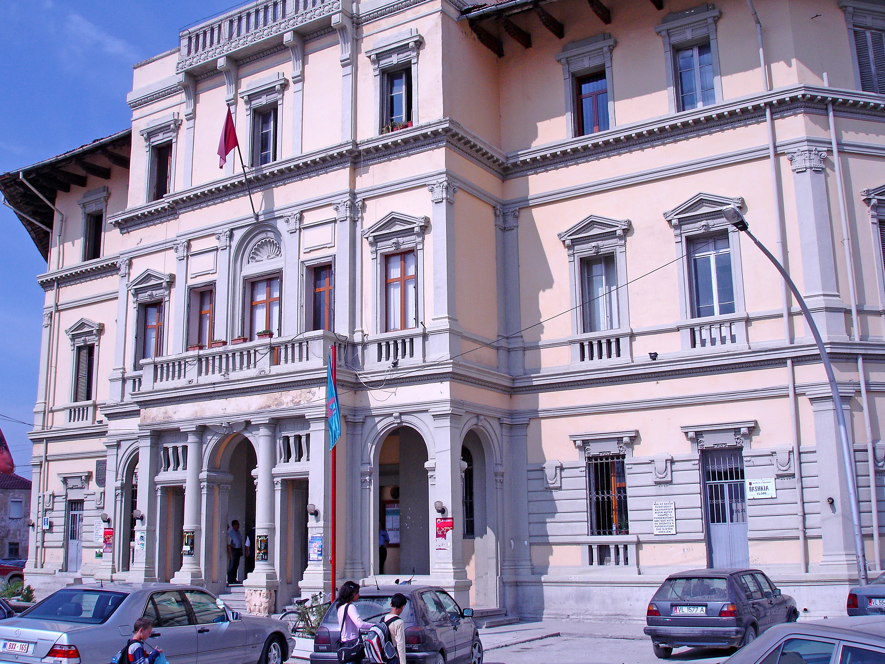 Bashkia Vlorë (Vlorë en albanais)